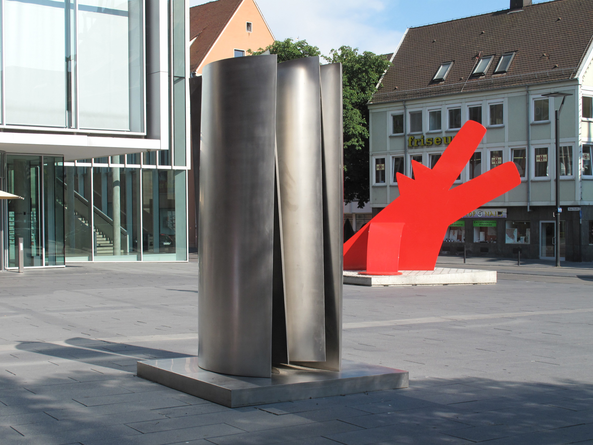 links: Erich Hauser, 1-74/81, 1981, rechts: Keith Haring, Red Dog, 1985, vor Kunsthalle Weishaupt, - Ulm, Baden-Württemberg, Deutschland